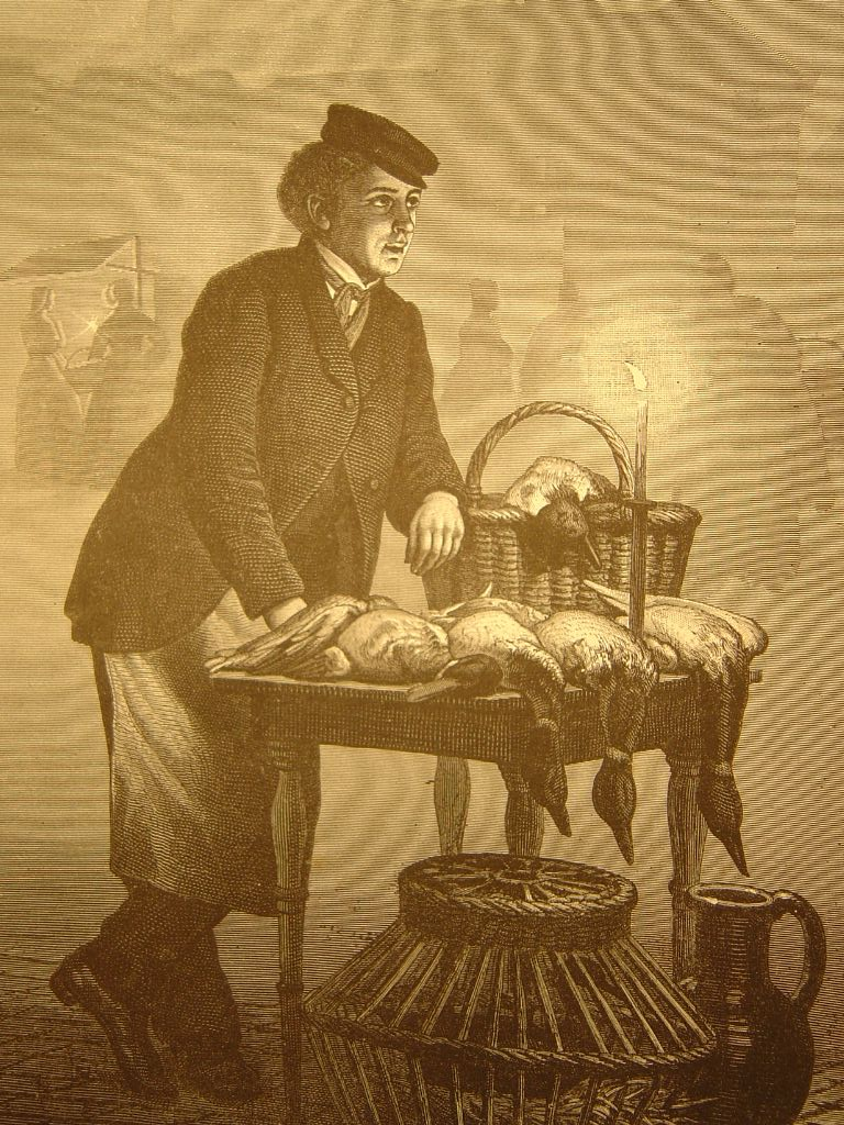 le marchand de volailles par p.Van Schendel